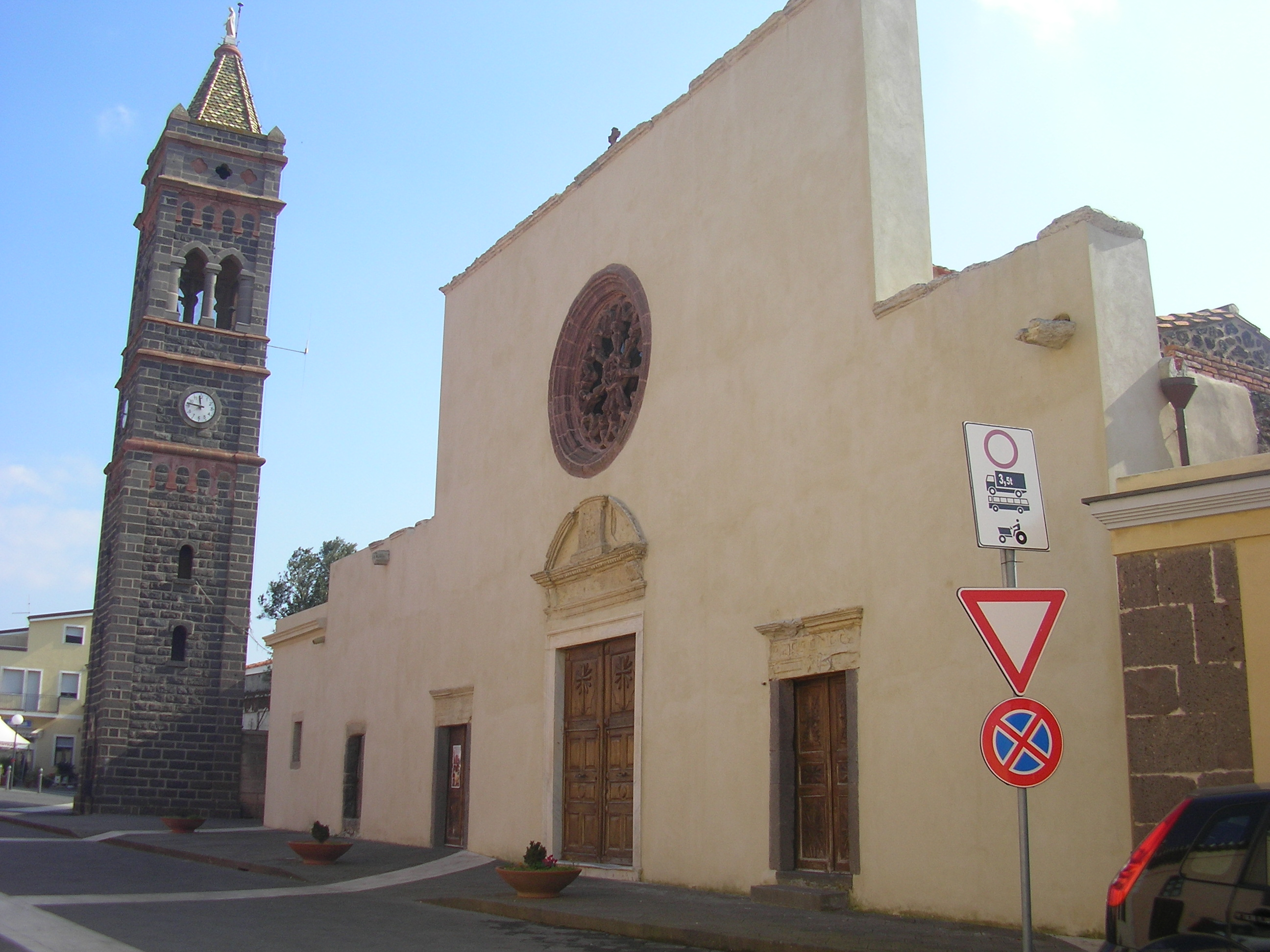 La chiesa parrocchiale dedicata a san Sebastiano, nella via Dante a Milis, Oristano, Italia.